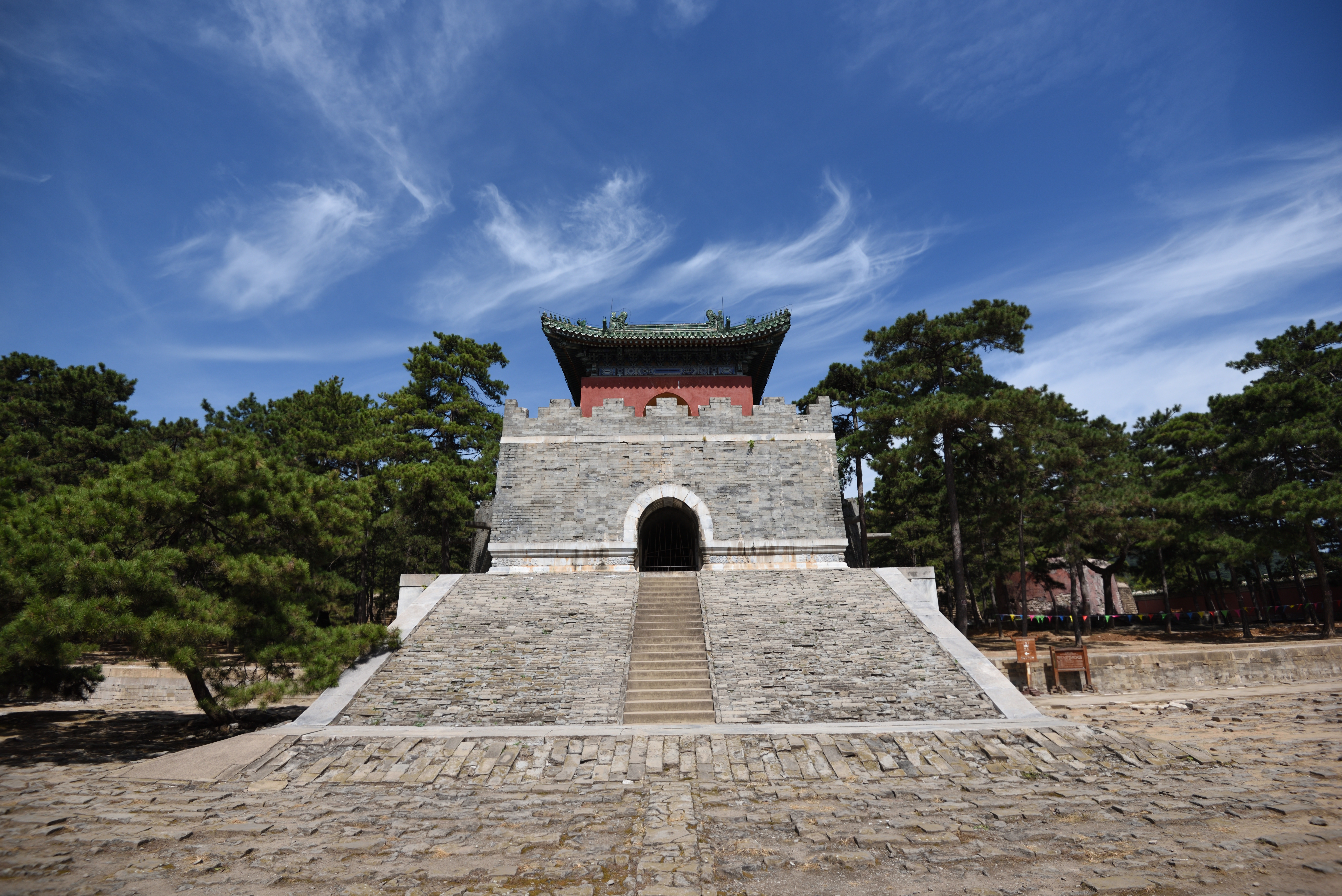 清东陵裕陵妃园寝